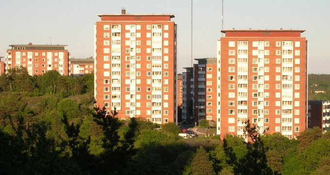 Alphyddan in Nacka, Sweden. Picture taken from Henriksdalsberget